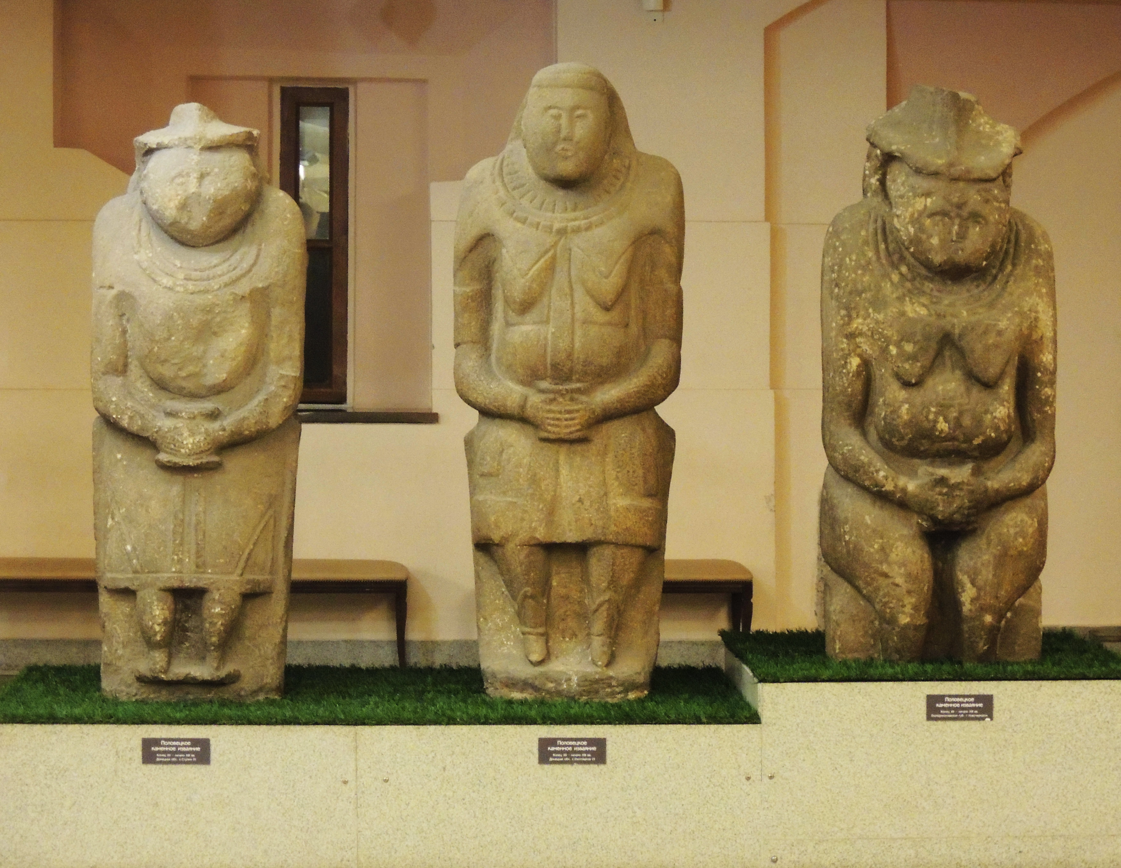 Sculpture in Moscow State Historical Museum. Polovets (cuman) statues. Половецкие бабы в ГИМе